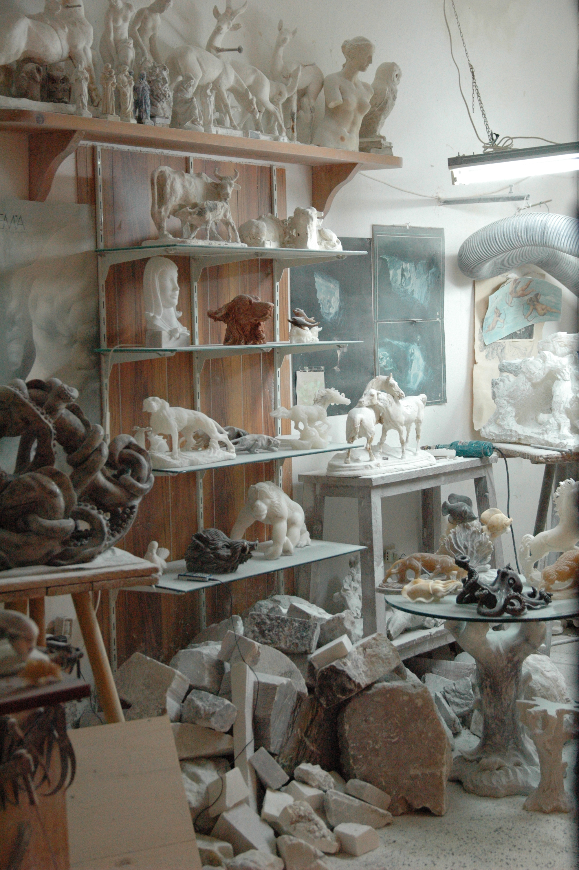 Lavorazione dell'alabastro, Volterra (Pisa)